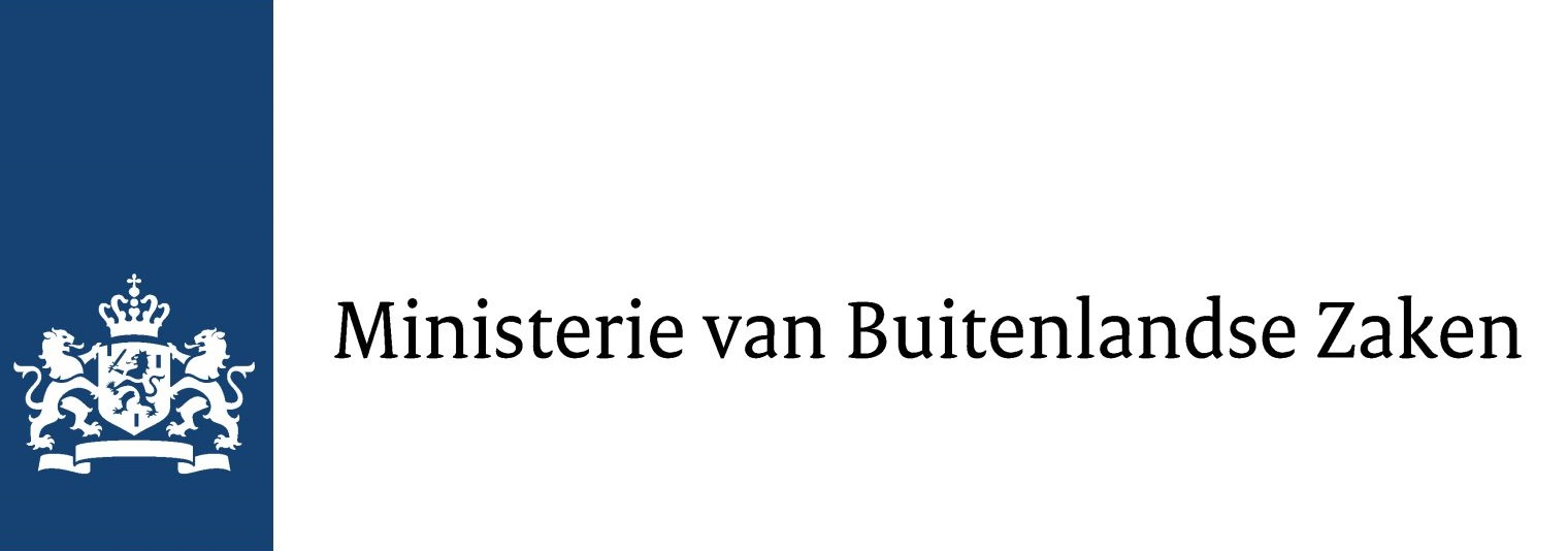 Het officiële logo van het Ministerie van Buitenlandse Zaken